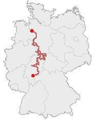 Course Map of Deutsche Märchenstraße